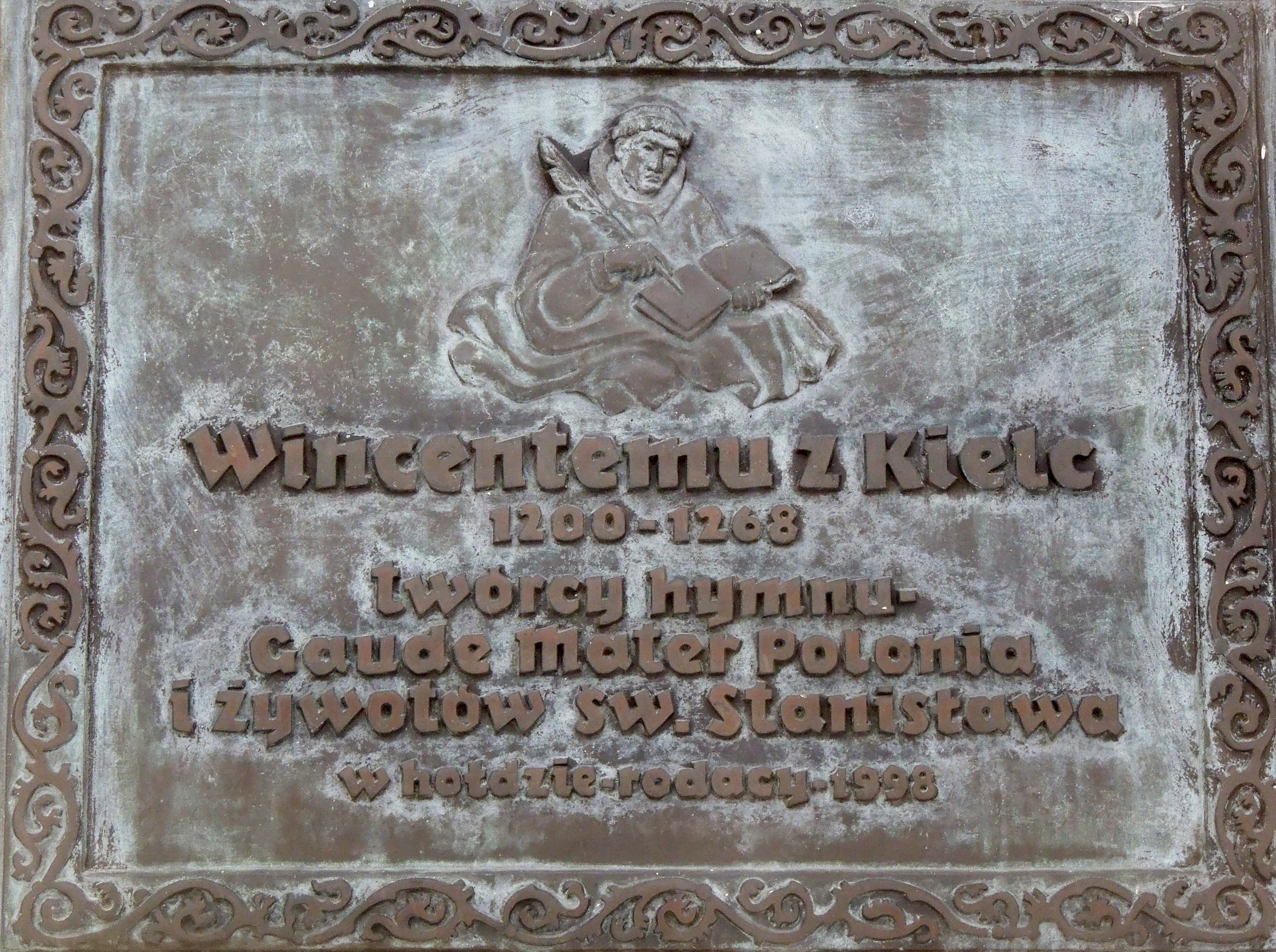 Tablica poświęcona Wincentemu z Kielc (ok.1200-1262), twórcy hymnu Gaude Mater Polonia i Żywotów św. Stanisława. Tablicę umieszczono po prawej stronie głównego portalu kieleckiej katedry w 1998 roku.